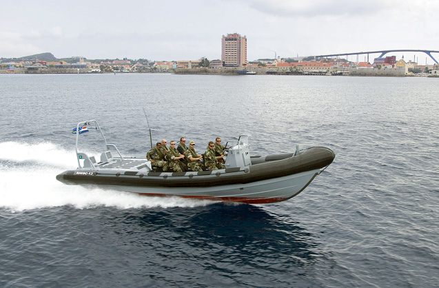 De frisc tijdens beproevingen in het Caribisch gebied (Min. van Defensie)